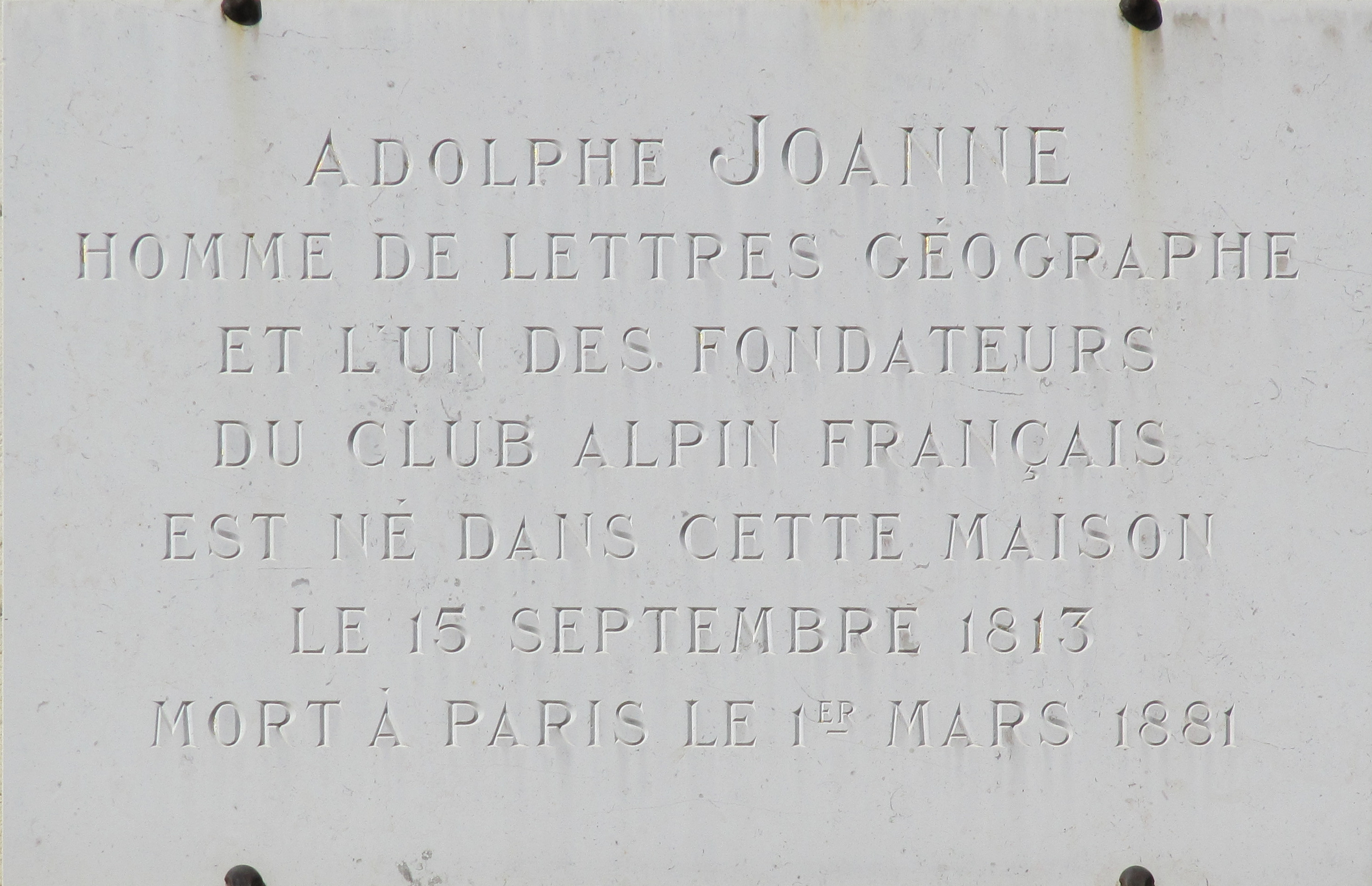 Plaque commémorative Adolphe JOANNE, 85 rue de la Liberté à Dijon